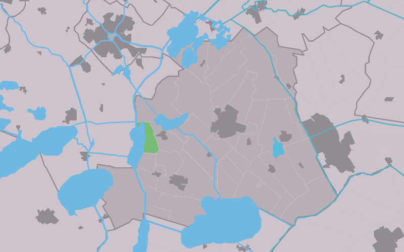 Kaartsje fan himrik fan Diken